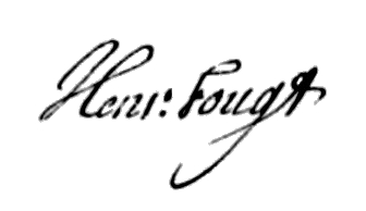 Signature of Henrik Fougt.